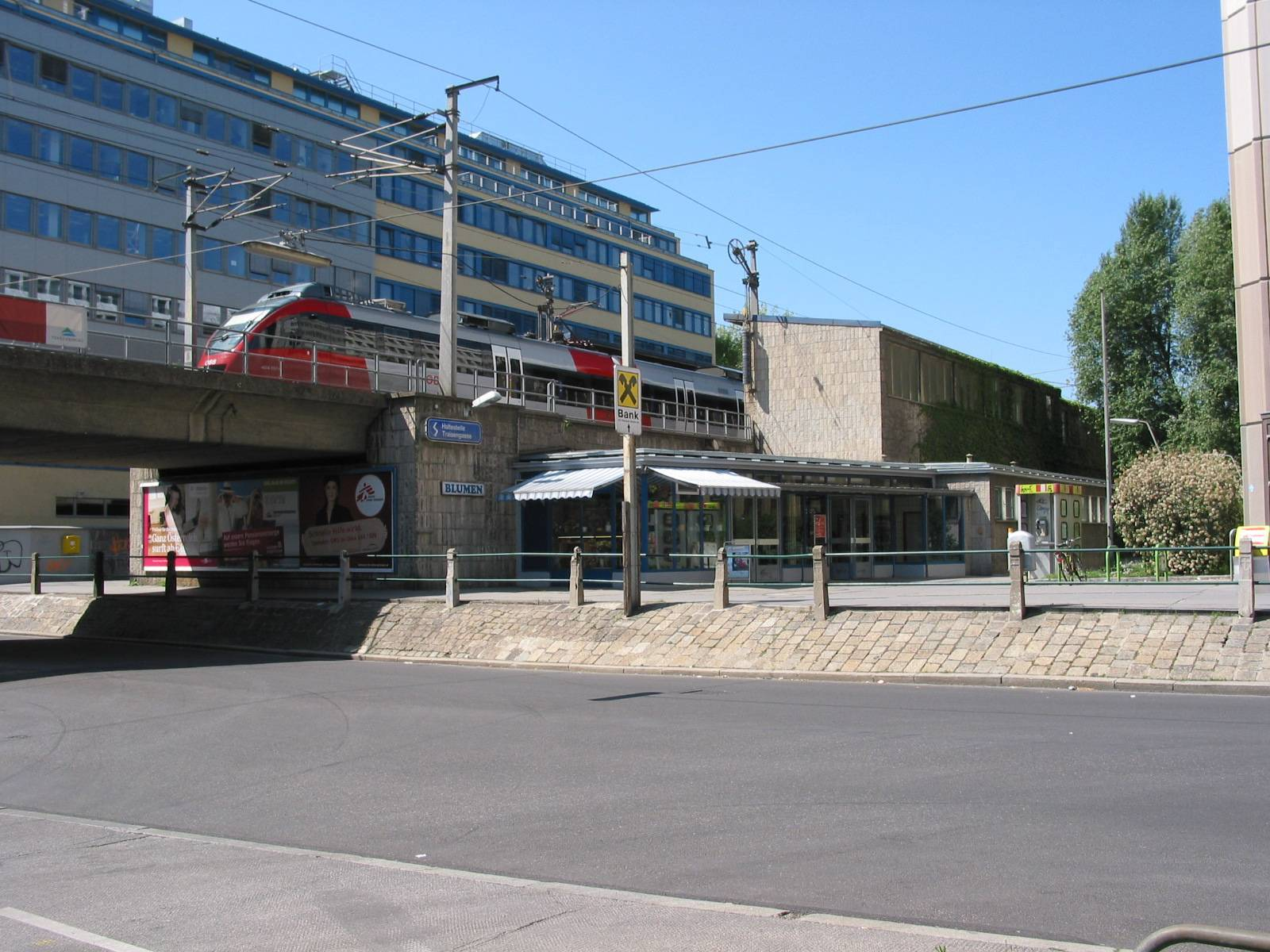 de: ÖBB 4024 in der Haltestelle Traisengasse der S-Bahn Wien en: EMU 4024 at Traisengasse station, Vienna, Austria